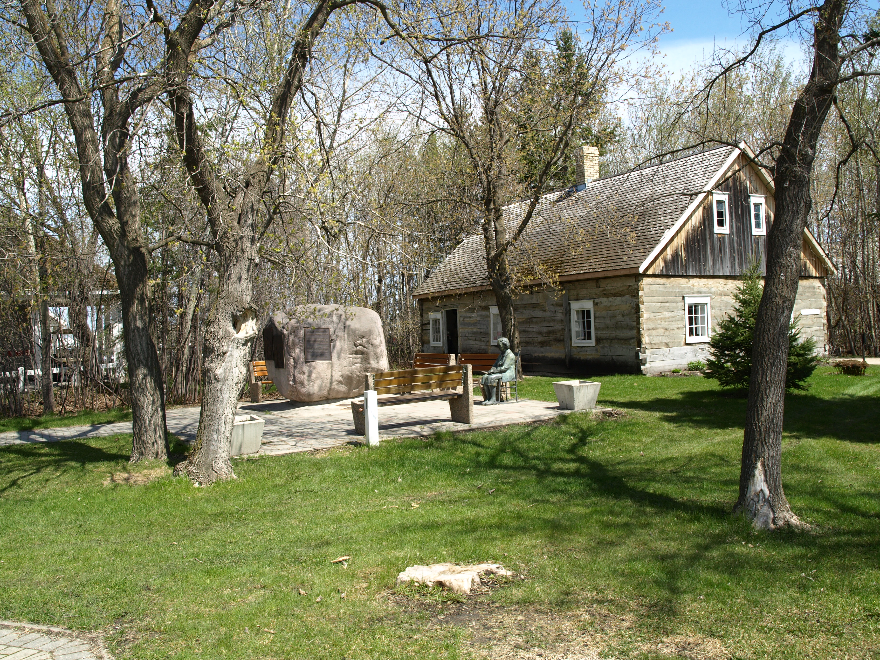 Mennonite Heritage Village Steinbach Manitoba Canada